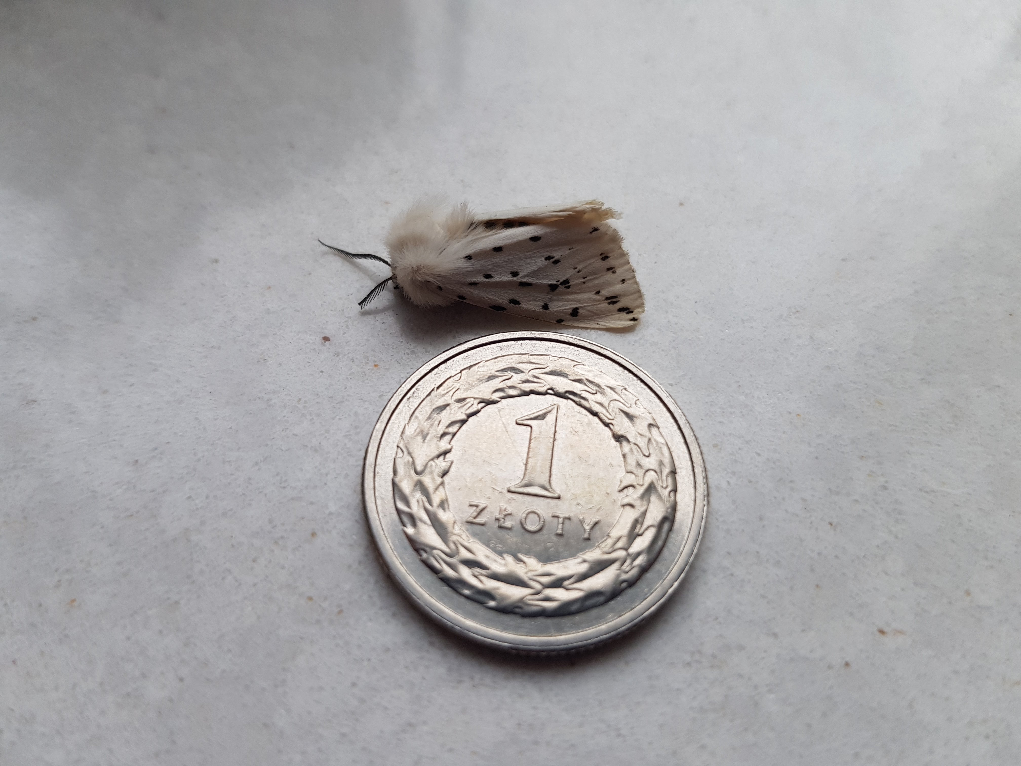 Szewnica miętówka (Spilosoma lubricipeda) sfotografowana na parapecie w moim domu.